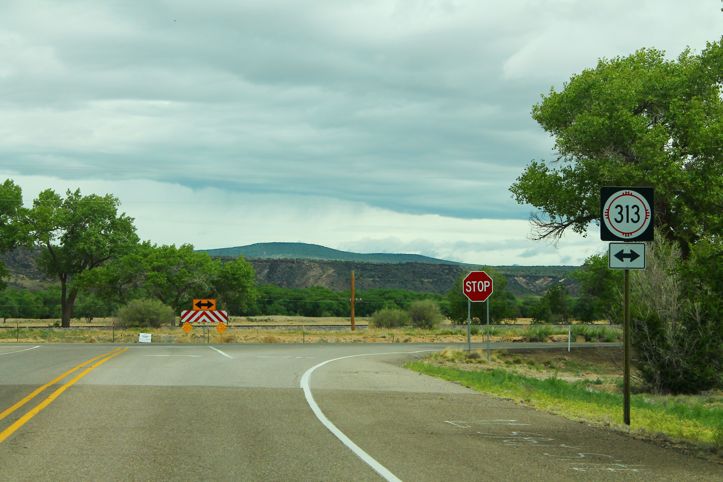 NM313 Sign at NM315 End